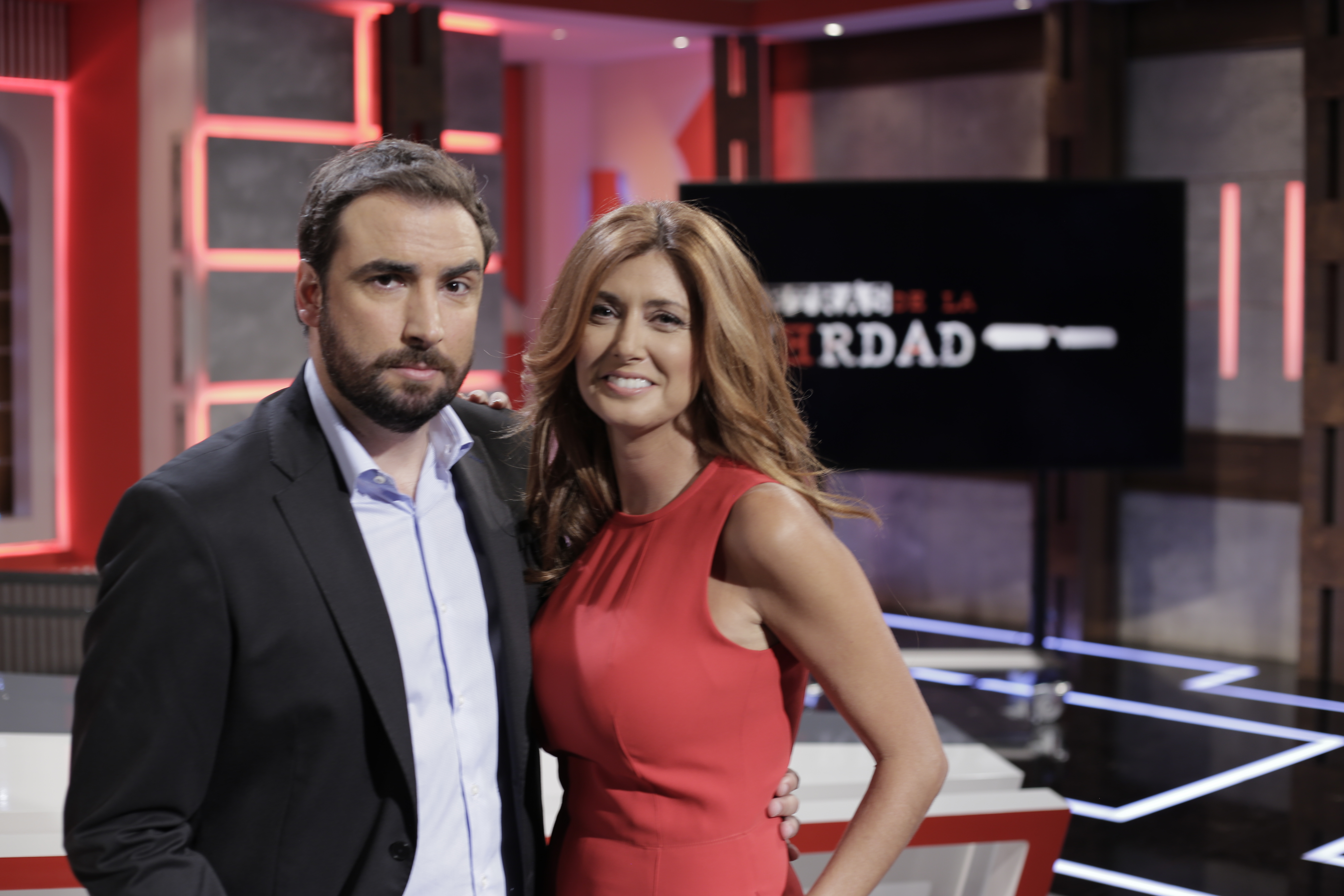 Patricia Betancort y David Aleman presentan de lunes a jueves "Detrás de la verdad"